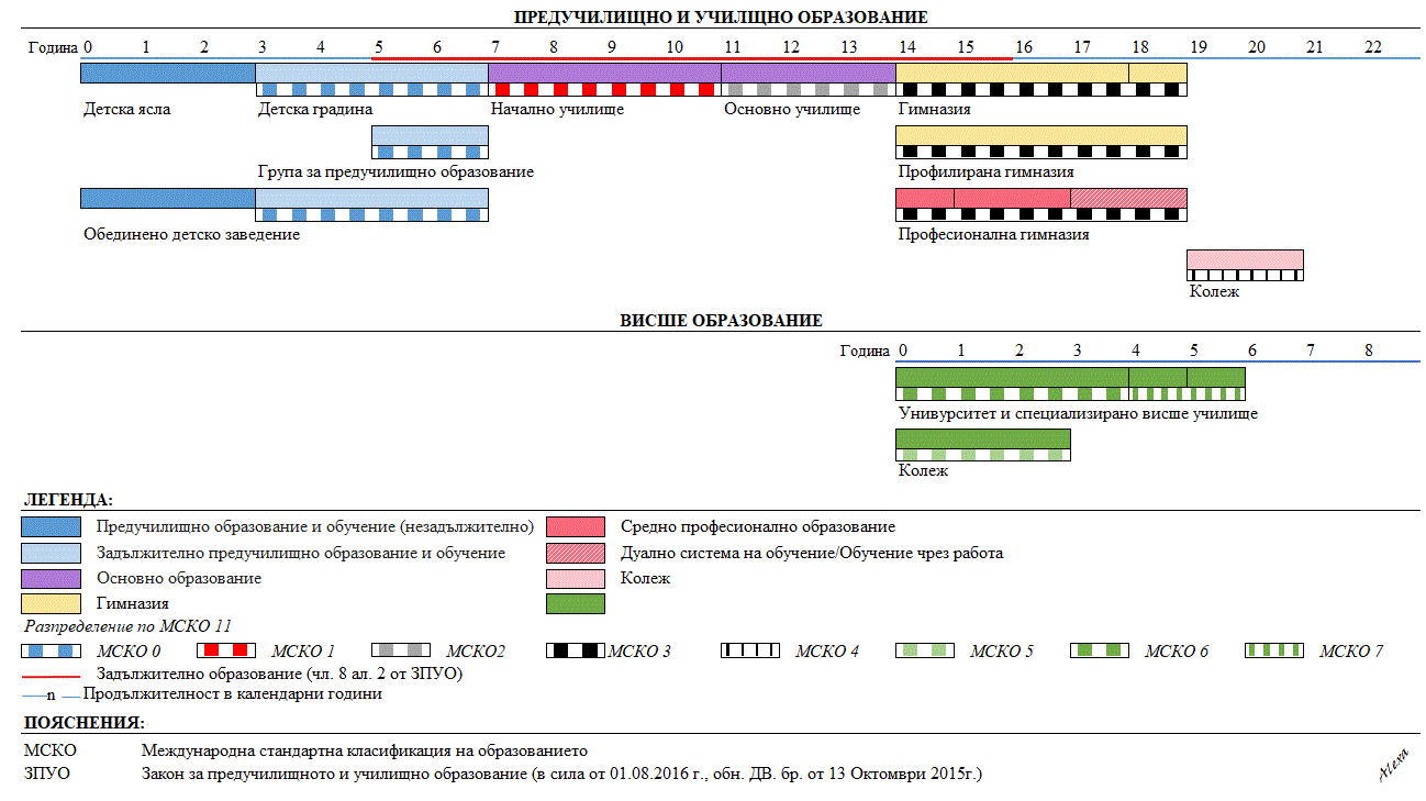 Схематична структура на образователната система на Република България